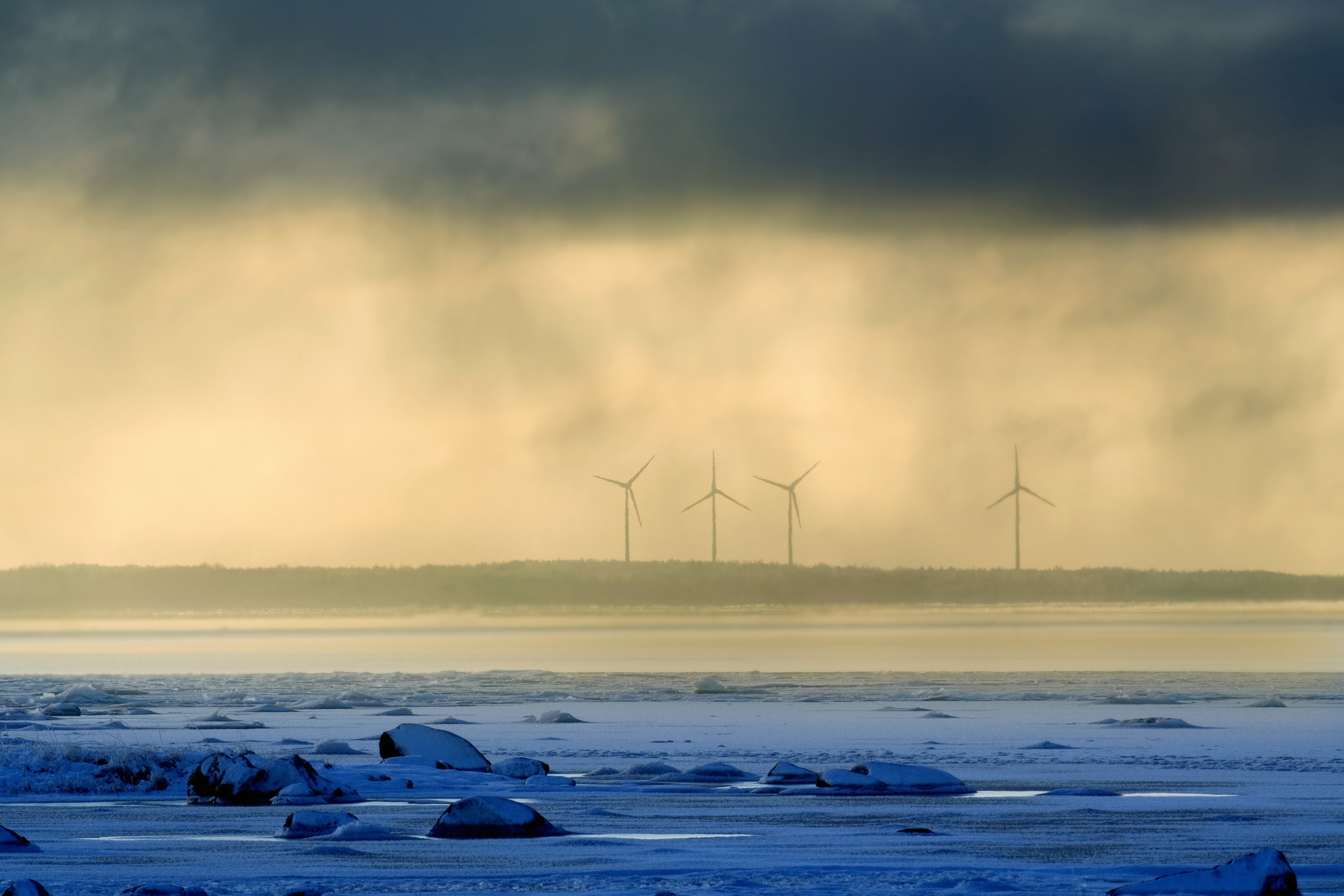 Virtsu tuulikud